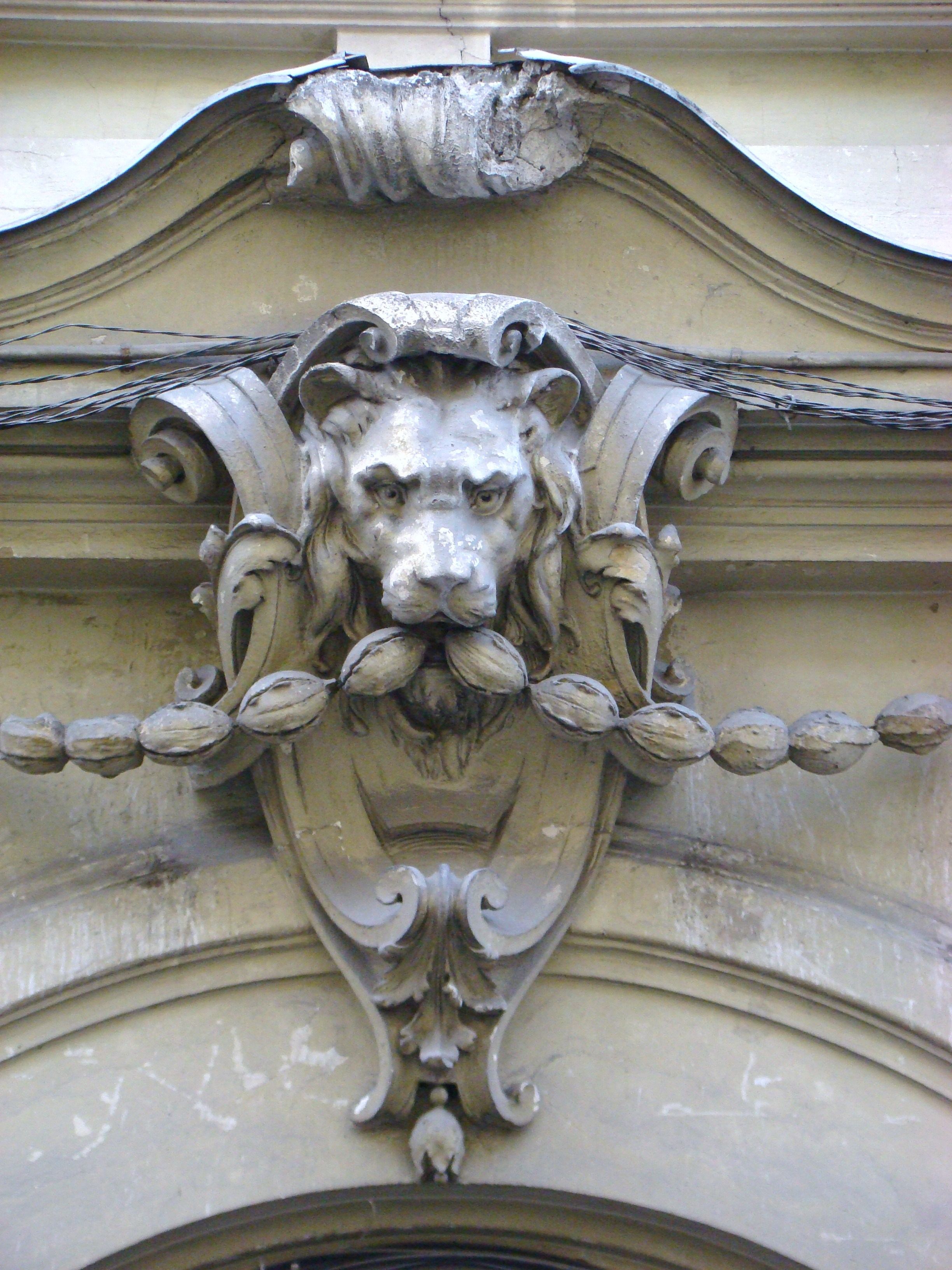 Clădire monument istoric, str.Iuliu Maniu, nr.1-5 (Palatele "Status-ului romano-catolic") 01